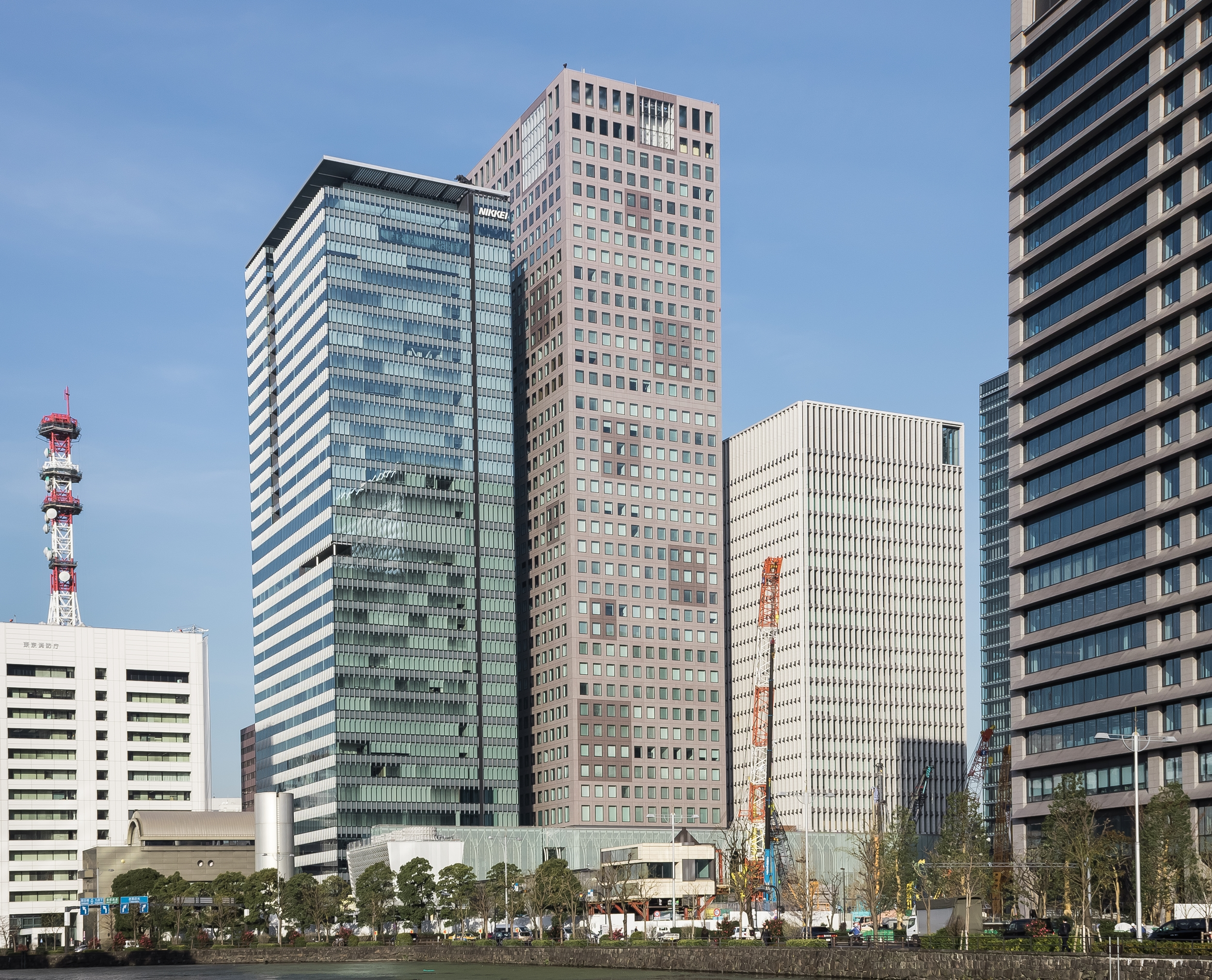 大手町カンファレンスセンター(左から日経ビル、JAビル、経団連ビル)